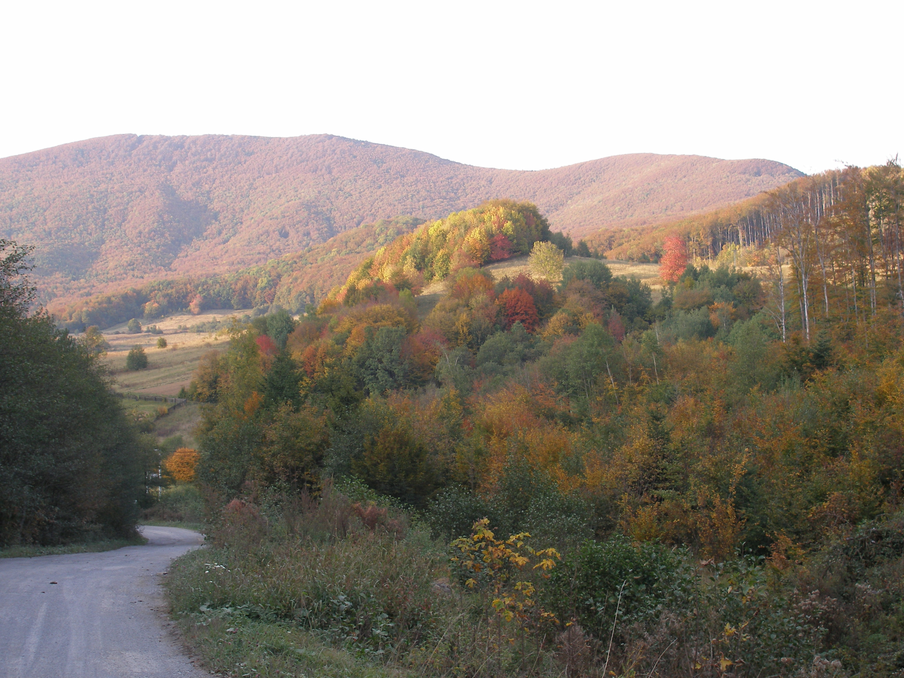 Jeseň nad obcou Zlatá Baňa okres Prešov, región Šariš